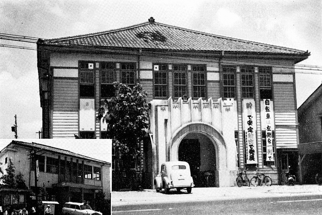 『守山市史』より守山市役所および志段味支所